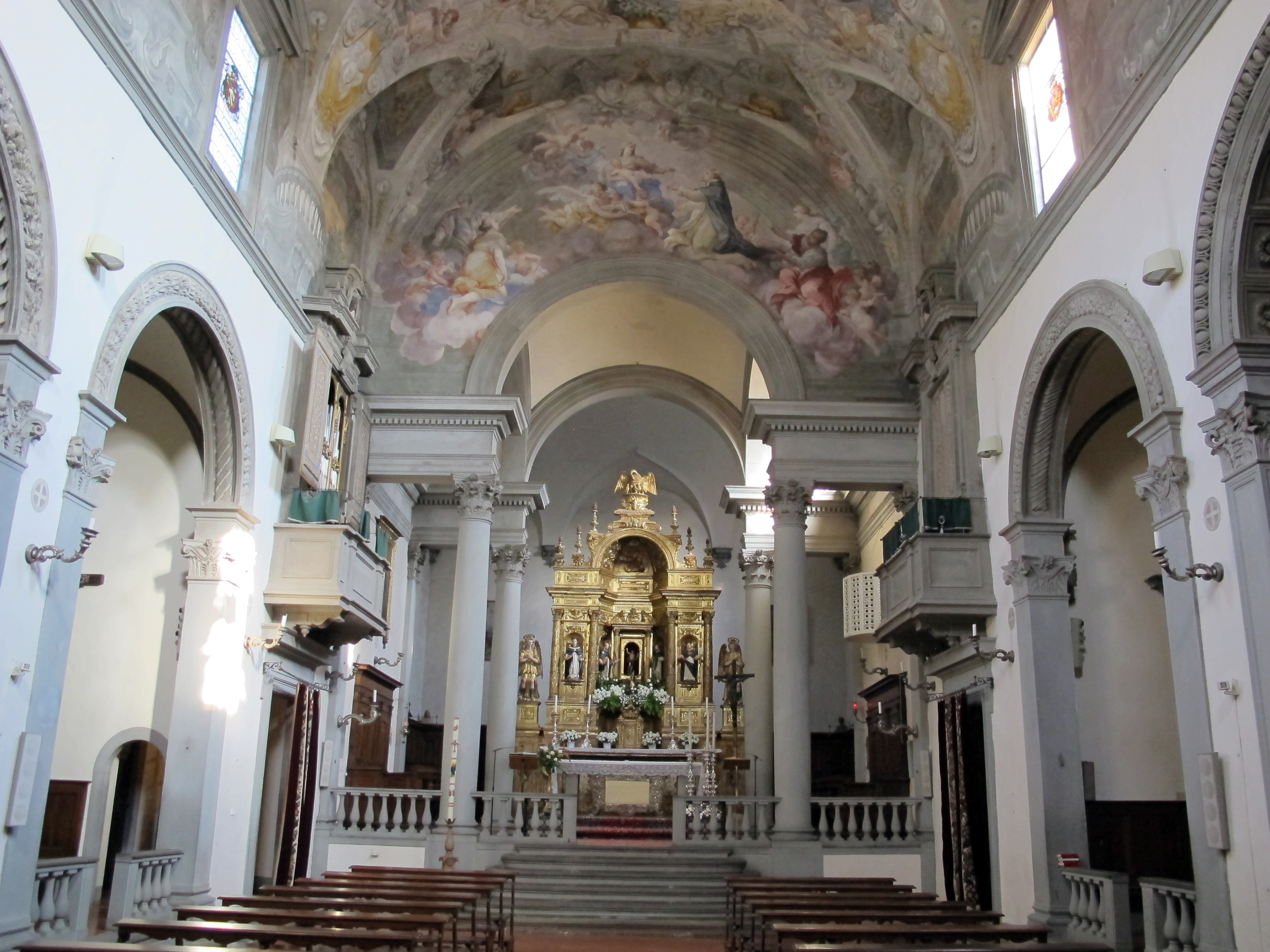 San domenico, fiesole, int.